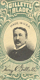 صورة جيليت على عبوات شفرات الحلاقة